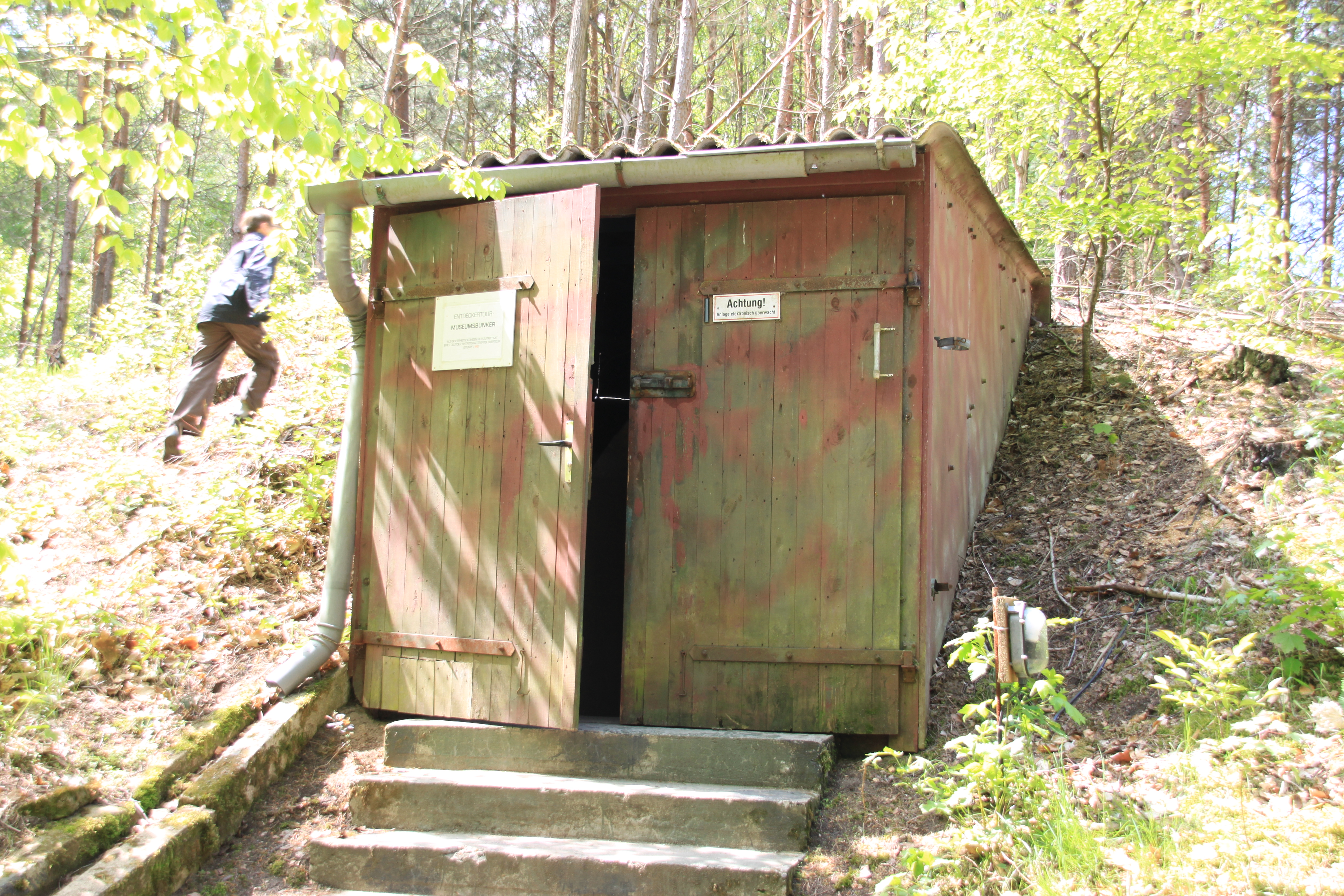 Äußerer Eingangsbereich eines der Bunker